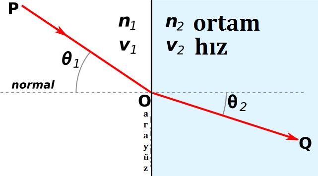 Snell yasası. İki yüzey arasında geçiş. (hava/su gibi)